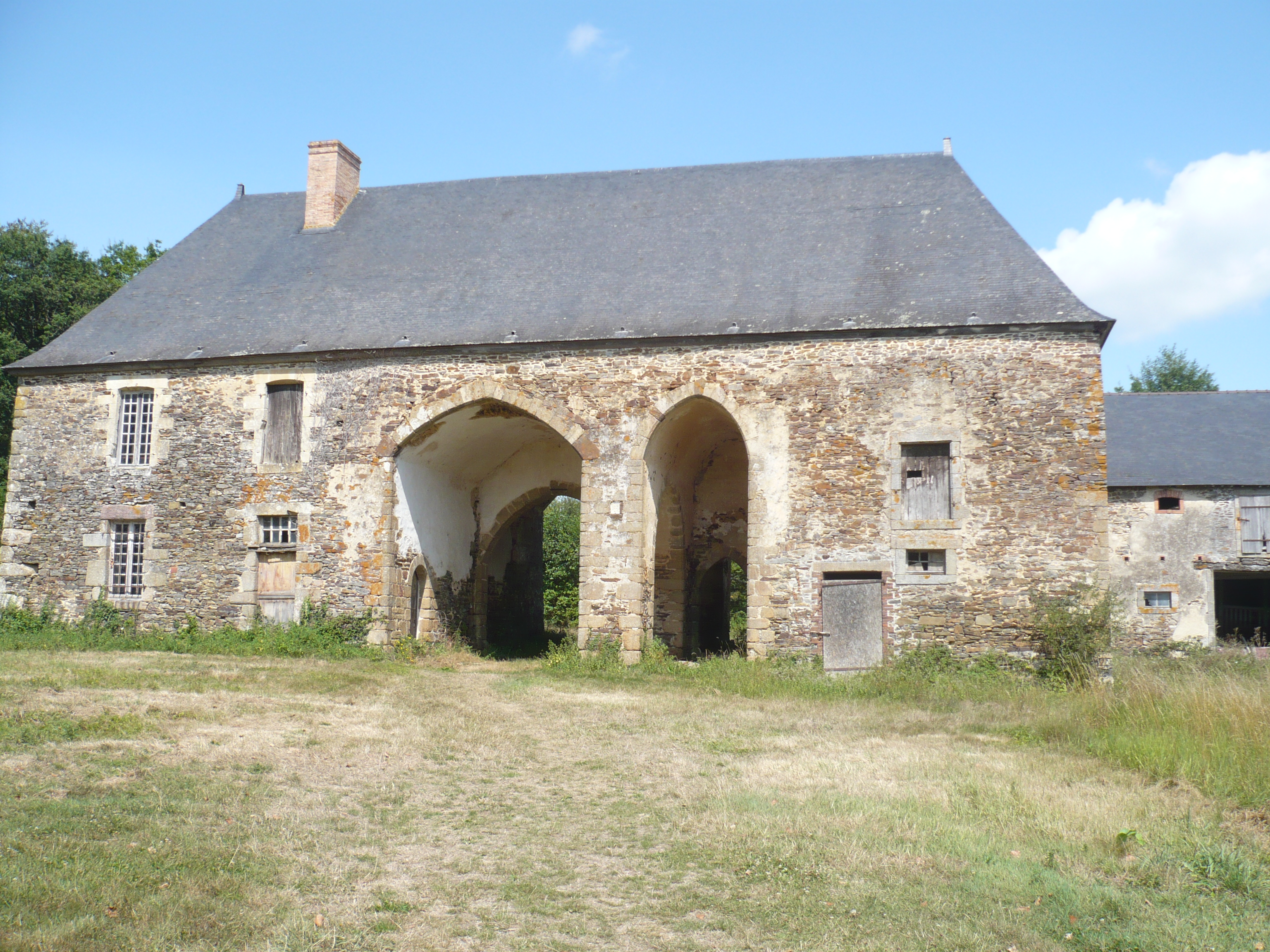 Kloster Clairmont (Mayenne), Torhaus